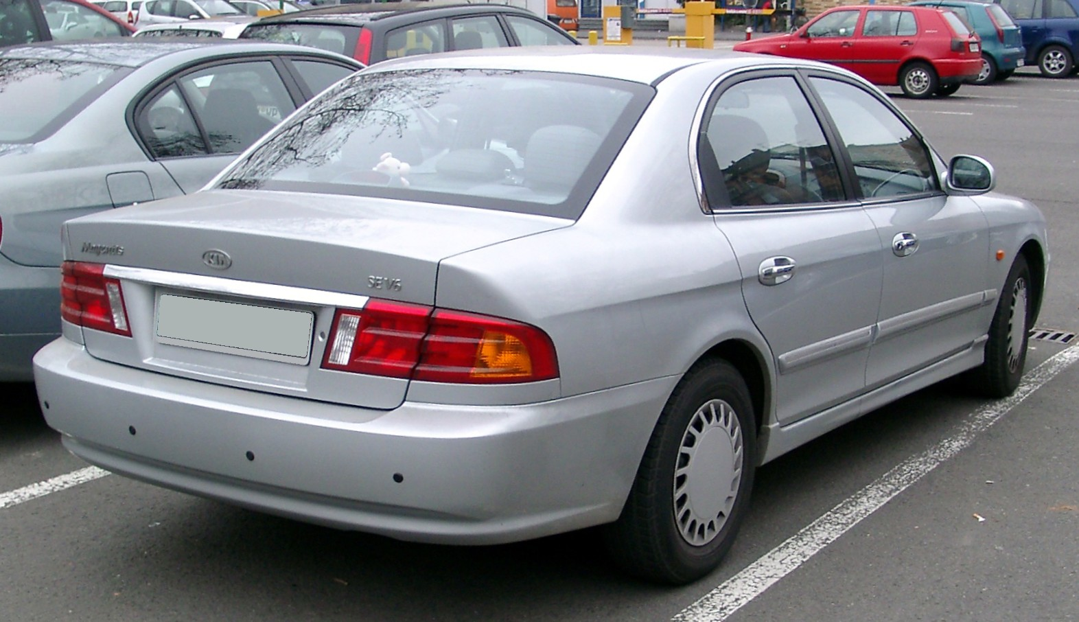 Kia Magentis, 1. Generation